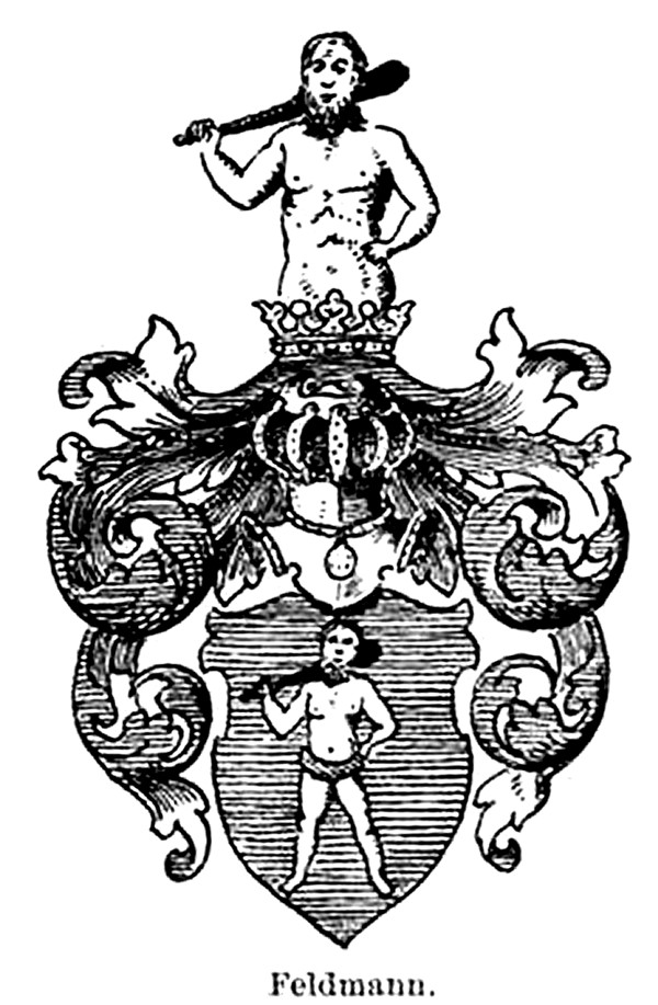 Familienwappen des Adelsgeschlechts Feldmann von Waldshut